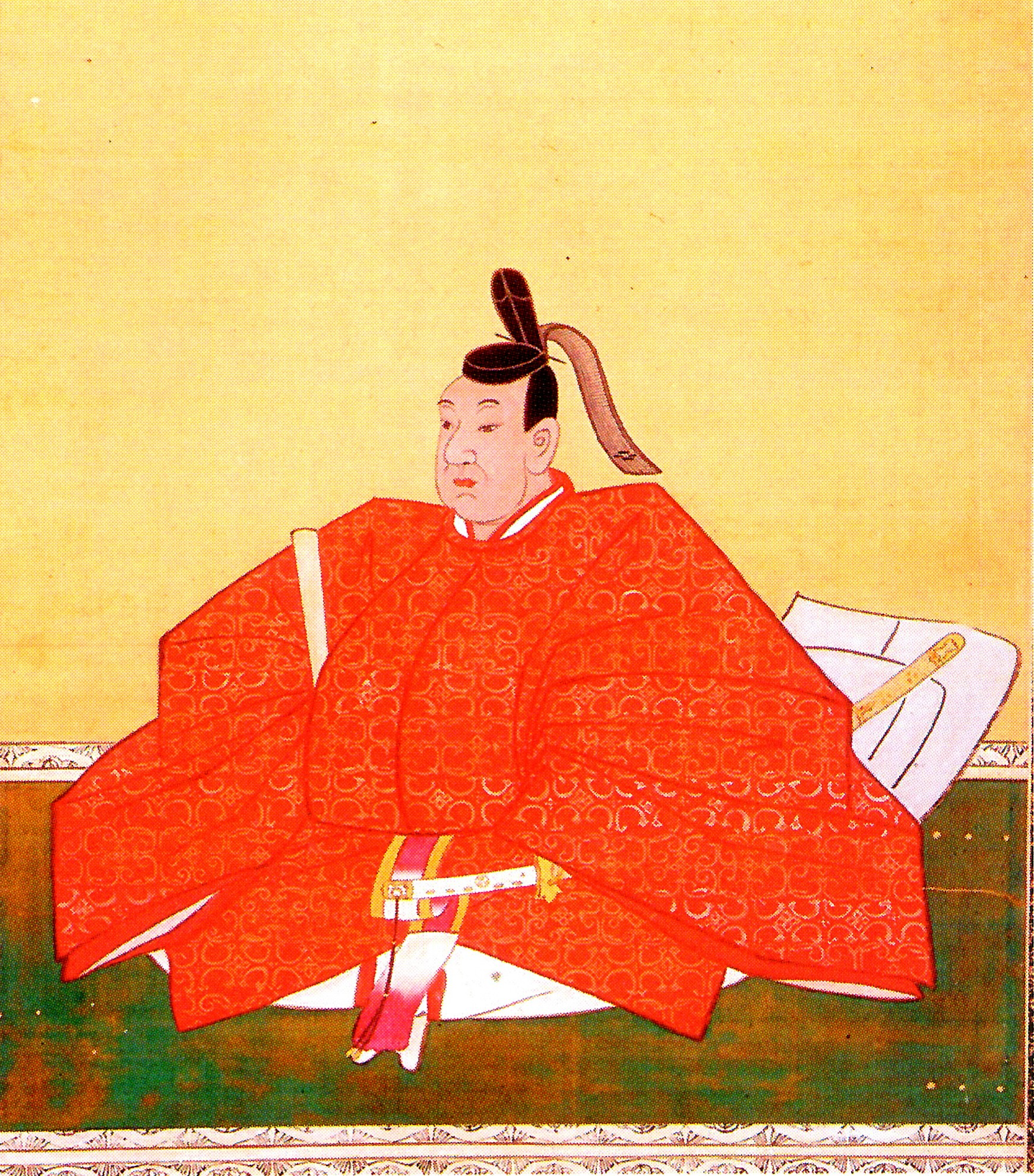 岡部長備の肖像。